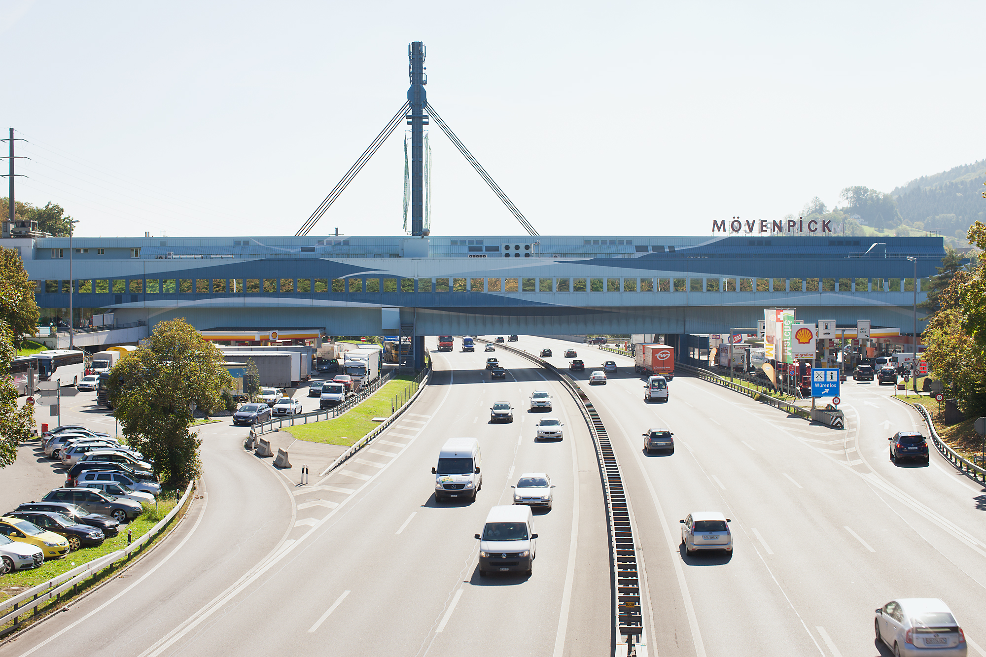 Die Shopping-Raststätte Würenlos über der Autobahn A1 in Fahrtrichtung Zürich. Der weiss-blaue Anstrich wurde beim Umbau 2004 hinzugefügt.